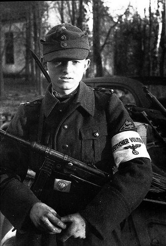 Zentralbild II. Weltkrieg 1939 - 45 Um ihr unvermeidliches Ende hinauszuzögern, verkündet die Naziclique am 18.10.1944 die Totalmobilisierung aller 16- bis 60jährigen Männer im "Volkssturm", dem letzten Aufgebot der Faschisten. UBz: einen 16jährigen Hitlerjungen im ostpreußischen "Volkssturm". Aufnahme Oktober 1944.